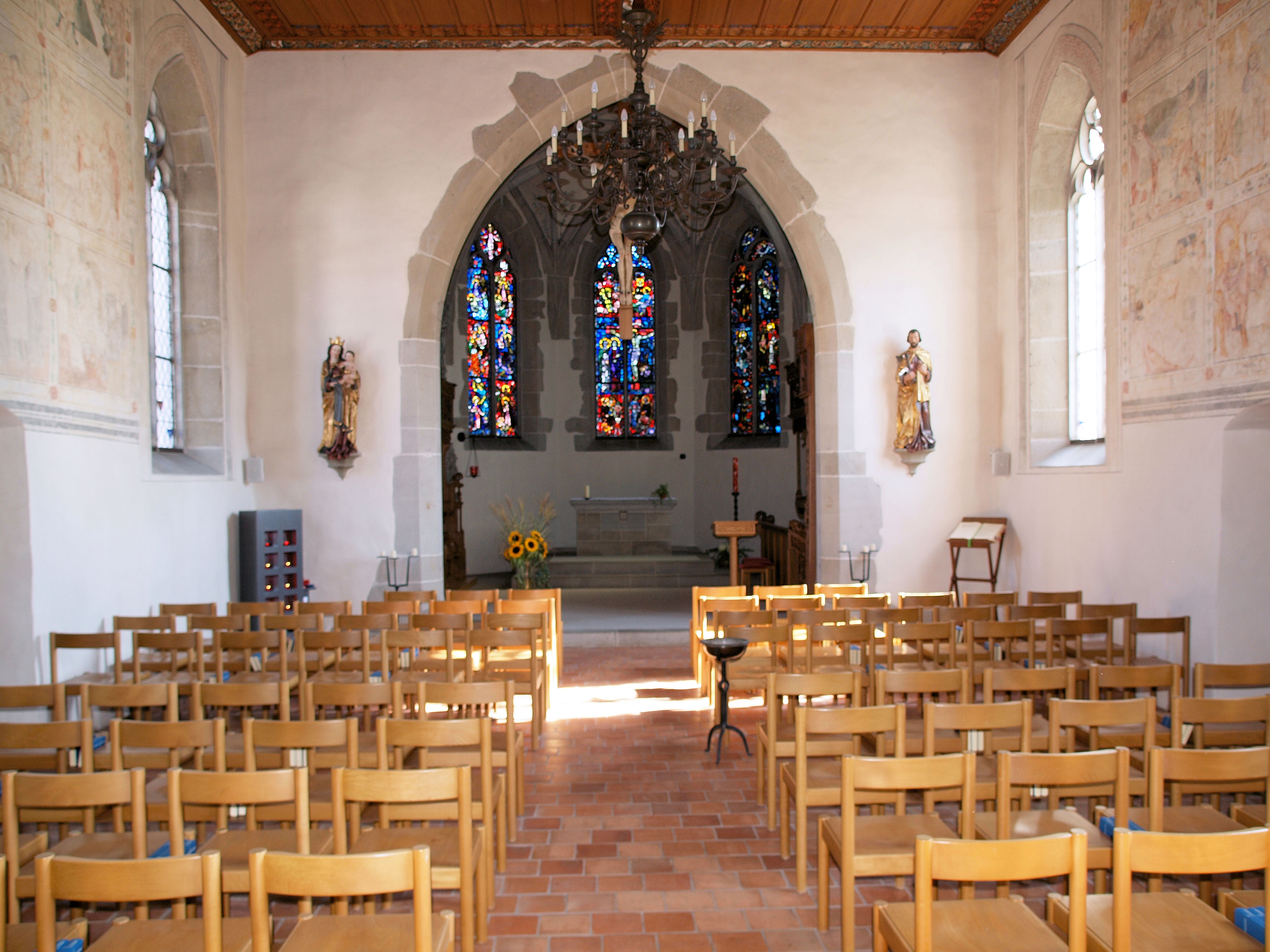 Der Innenraum der Kirche st. Wolfgang in Hünnen Berg SZ. Sicht vom Eingang in Richtung Chor (Richtung Osten)